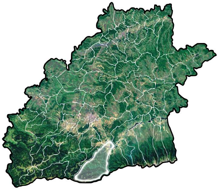 Talmaciu jud Sibiu.